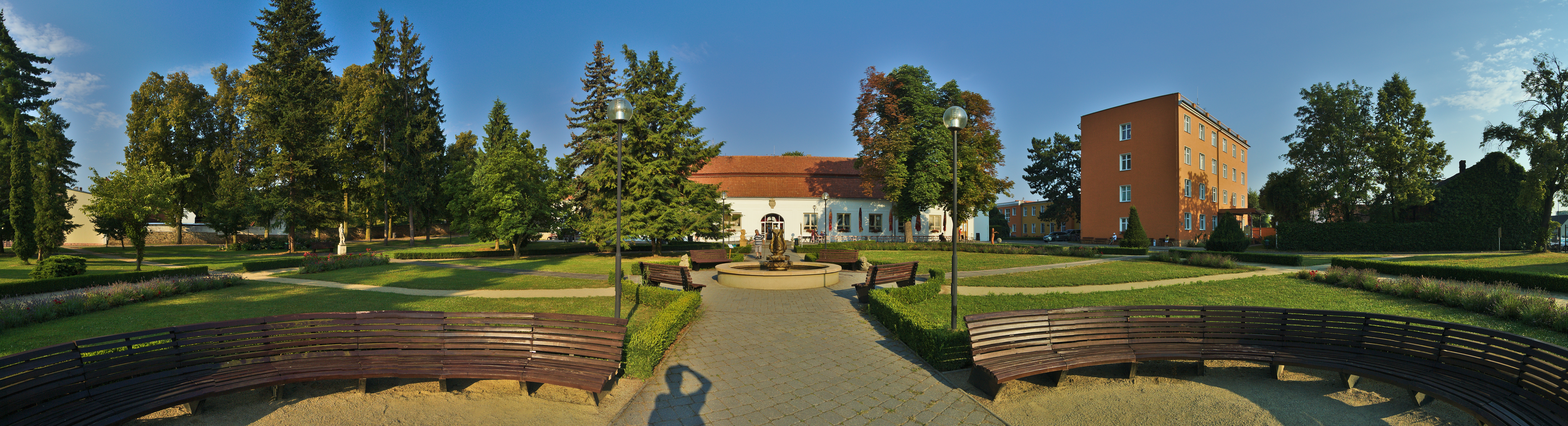 Lázeňský dům Morava, Slatinice, okres Olomouc